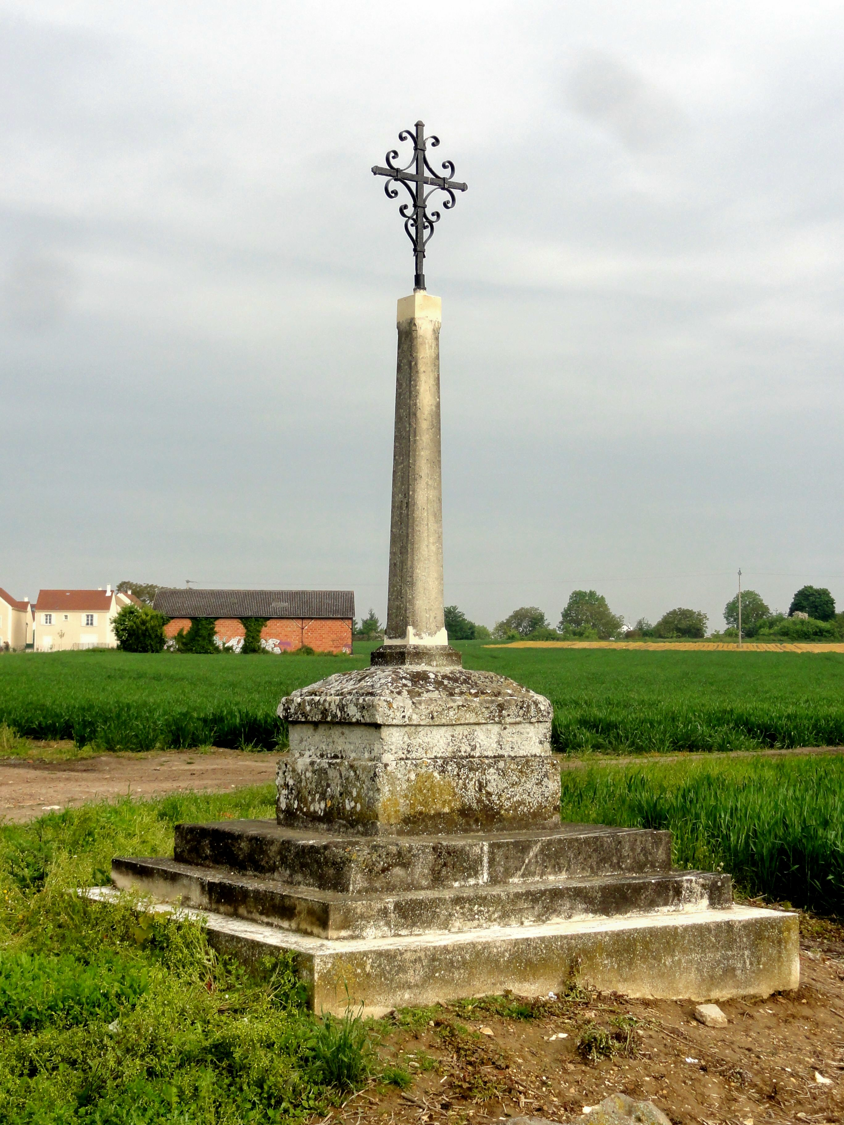 Croix d'Autel, ancienne route de Beauvais.